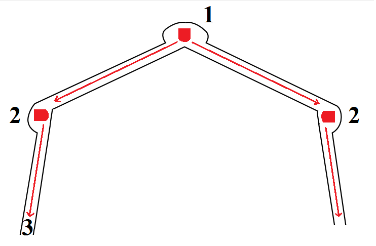 Kojce: 1. Podwójny (obustronny). 2. Pojedyńczy (jednostronny), 3. Fosa. Strzałki - kierunki ognia.